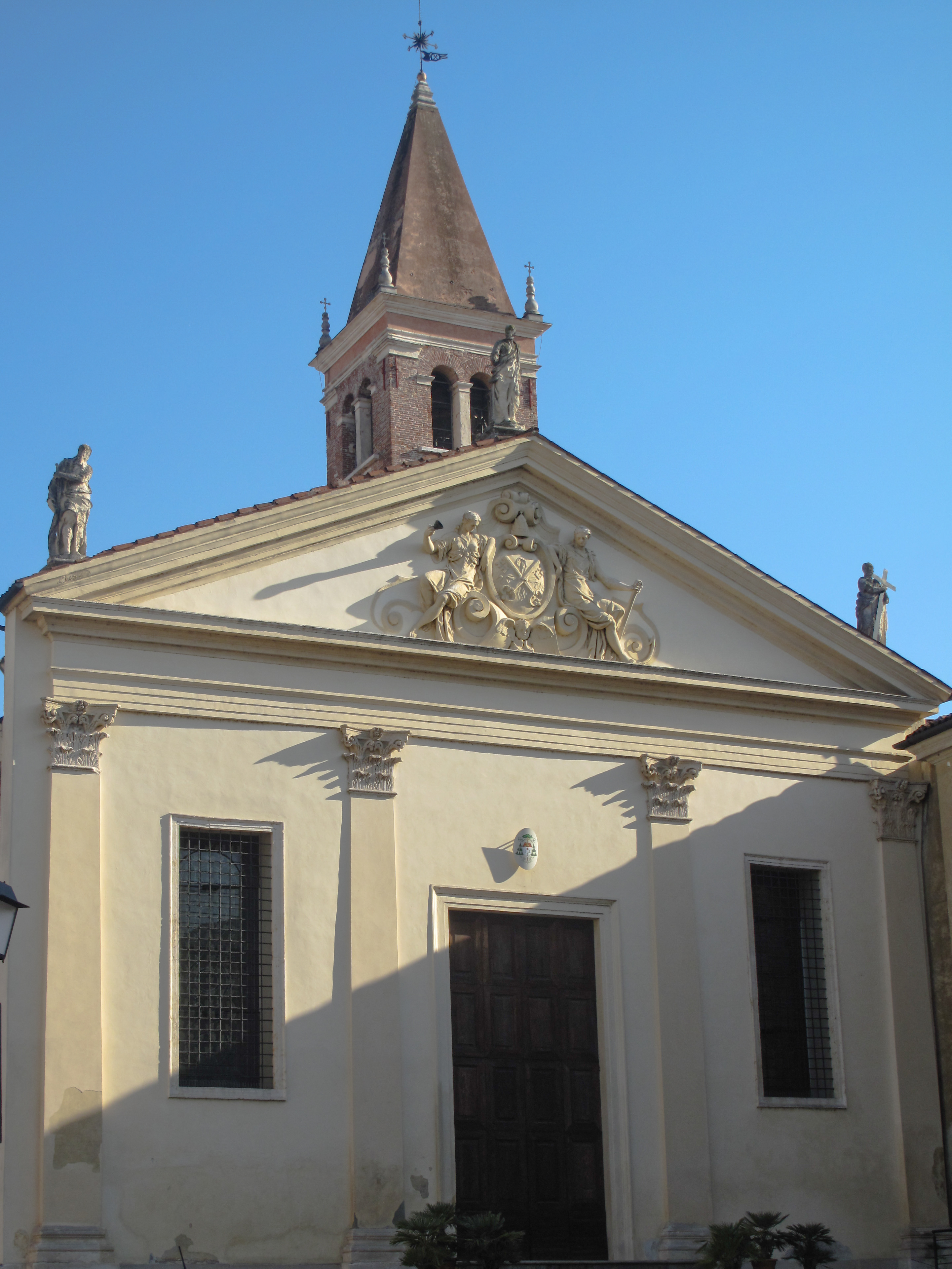 Facciata